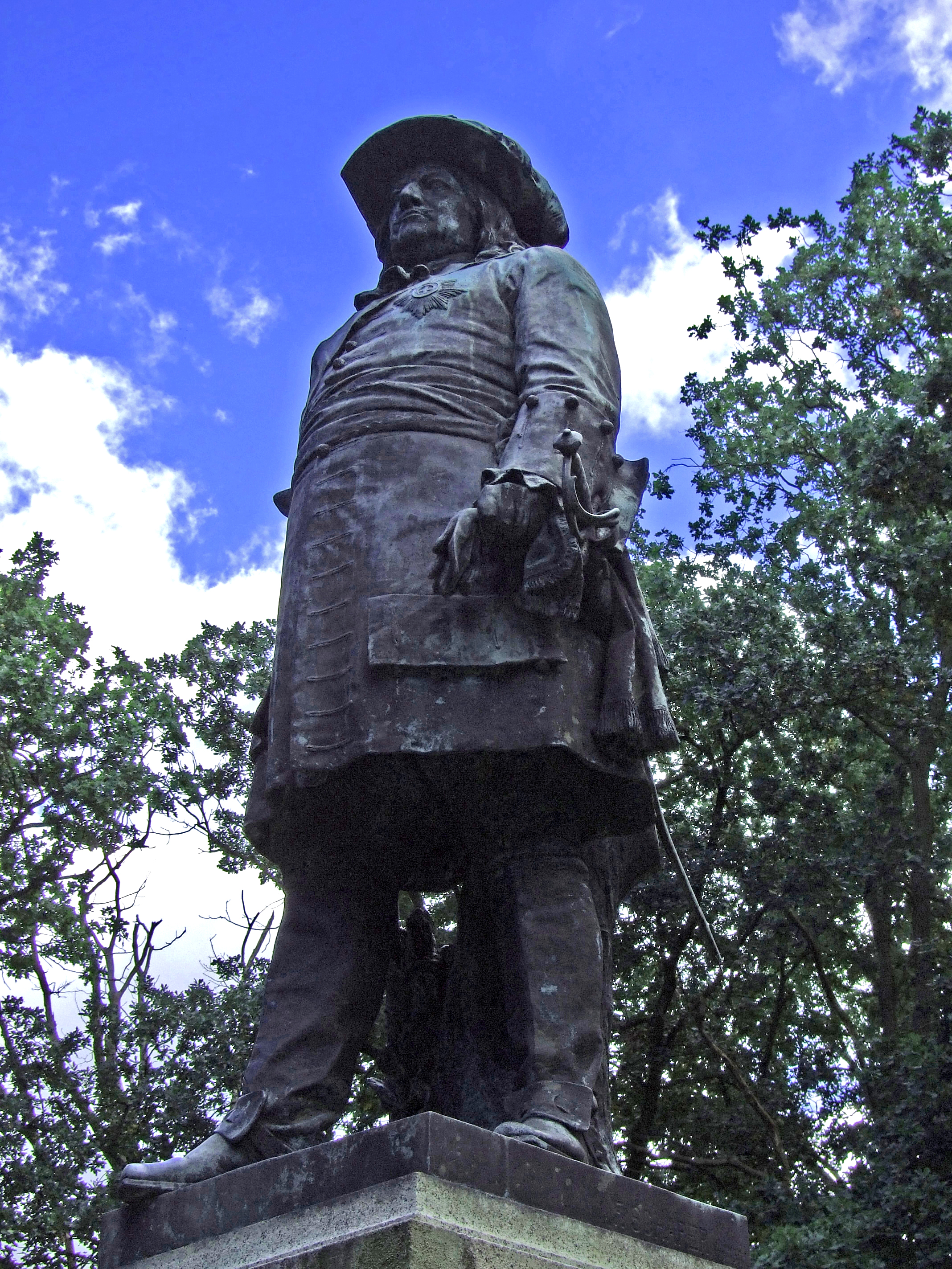 Standbild des Großen Kurfürsten in Fehrbellin von Fritz Schaper